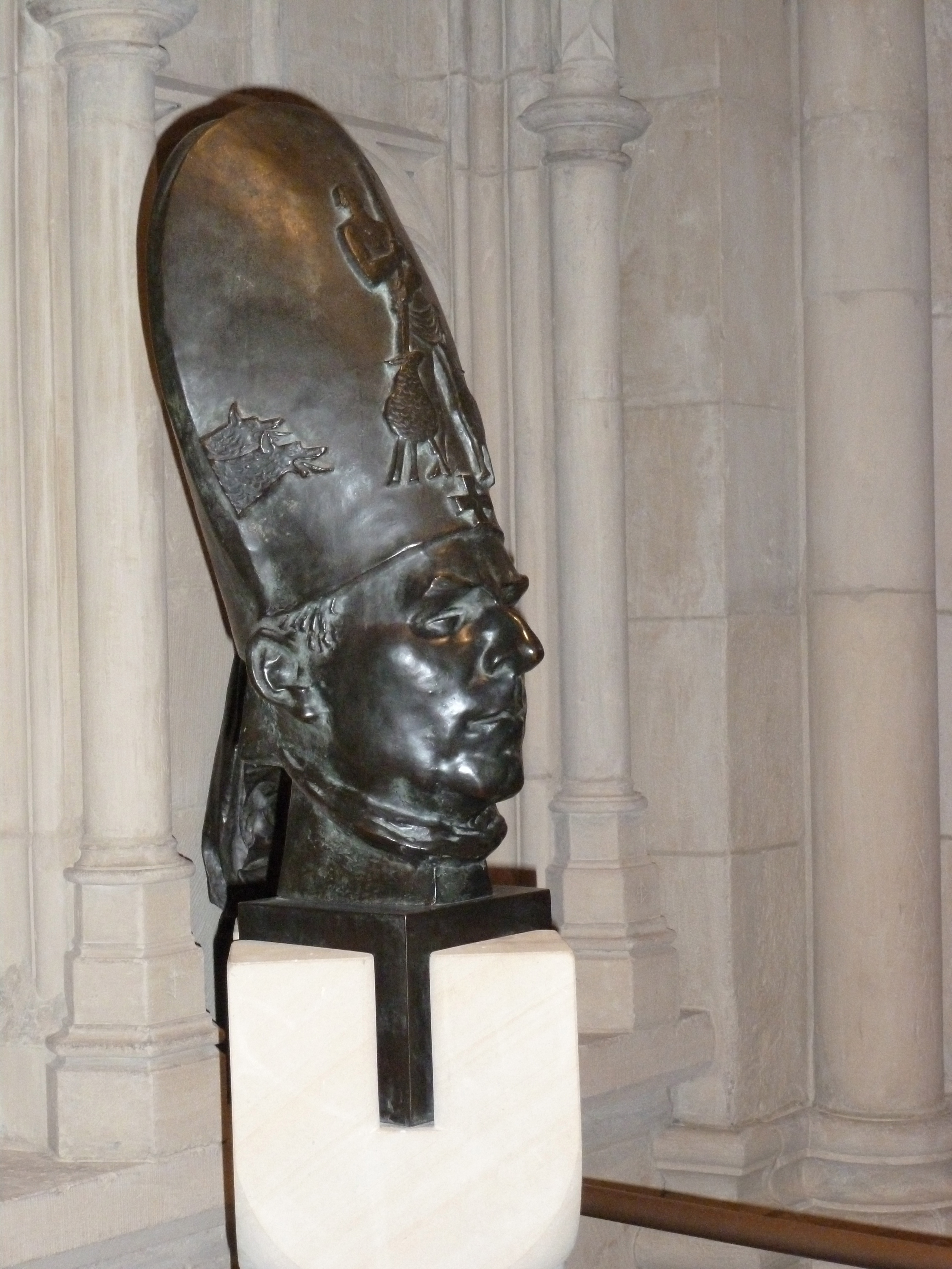 Paulusdom Bildniskopf von Galen